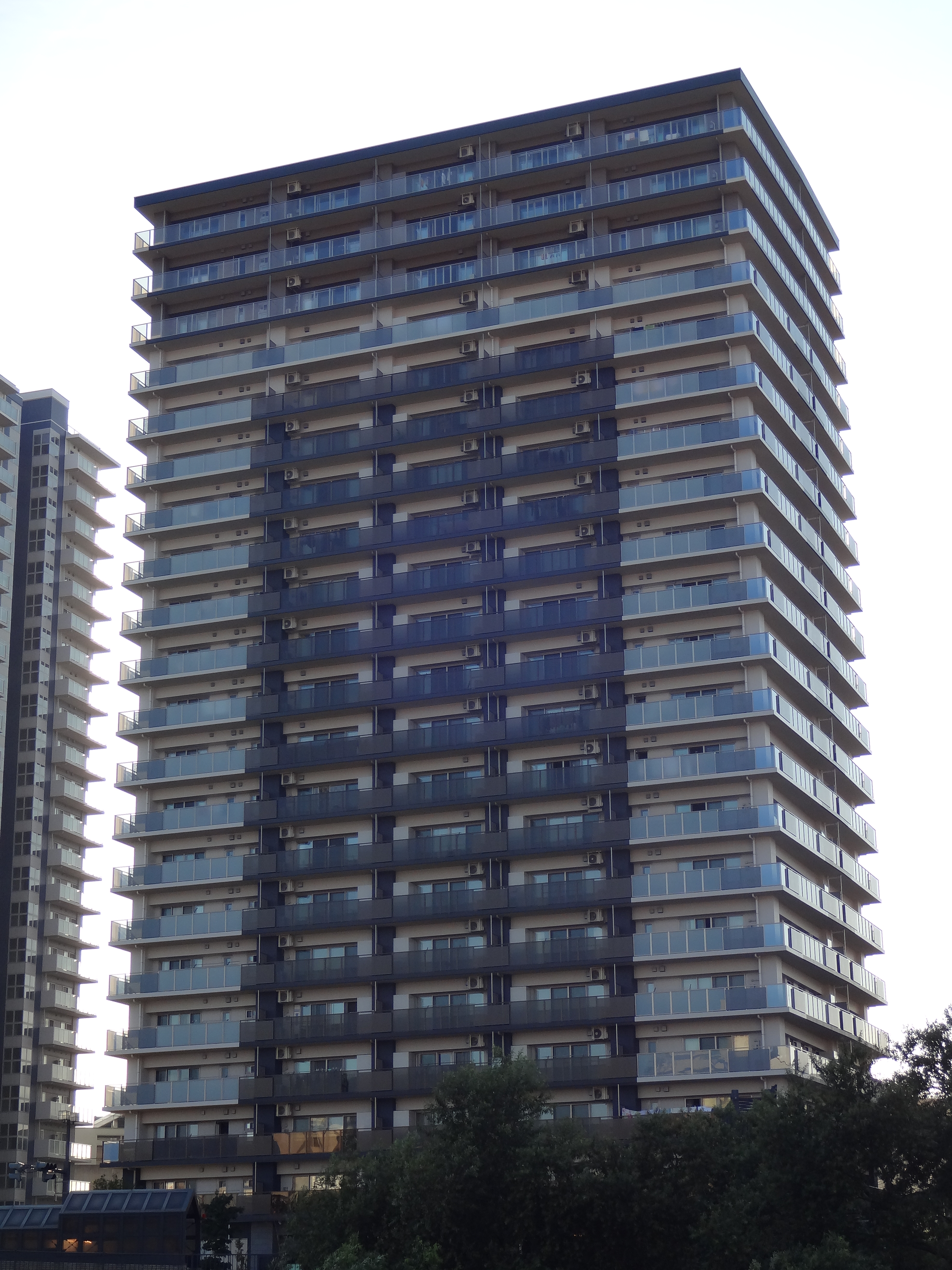 盛岡市の盛岡駅前に存在するタワーマンションです。